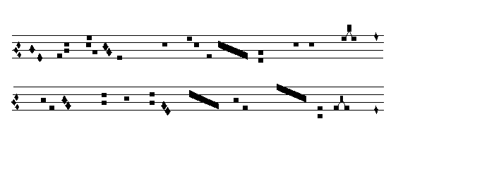 格里高利圣咏记谱法，这是方洪渐根据资料自己画的。每一行前面有三个菱形谱号，最后一行有一个菱形号提示下一行的音高，这种记谱法已经是五线谱的雏型了，但只有四线。